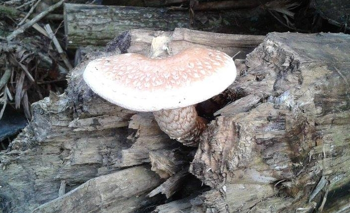 pholiote destructrice photographier dans le nord pas de calais en 2015